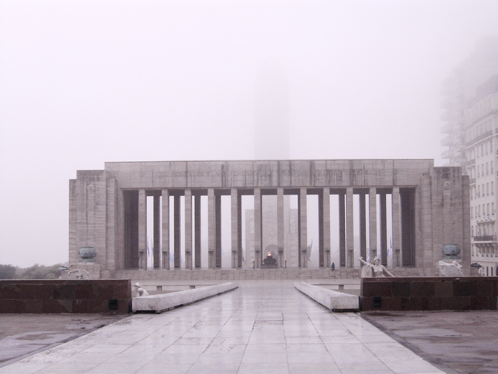 Imagen, de una escena con niebla, del Propileo del Monumento Histórico Nacional a la Bandera (National Flag Memorial) in Rosario, Argentina. Source: photographed by myself Photographer: Rosarinagazo